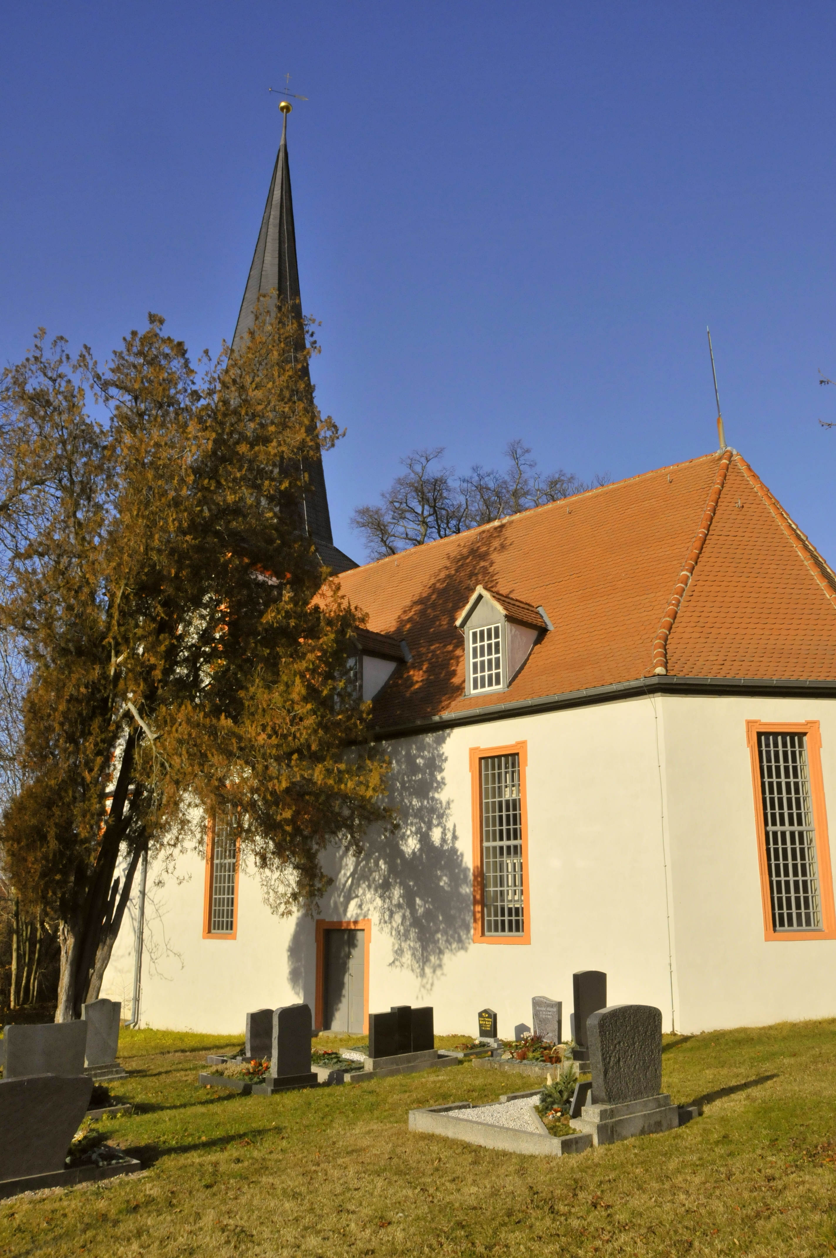 Werningsleben, Dorfkirche